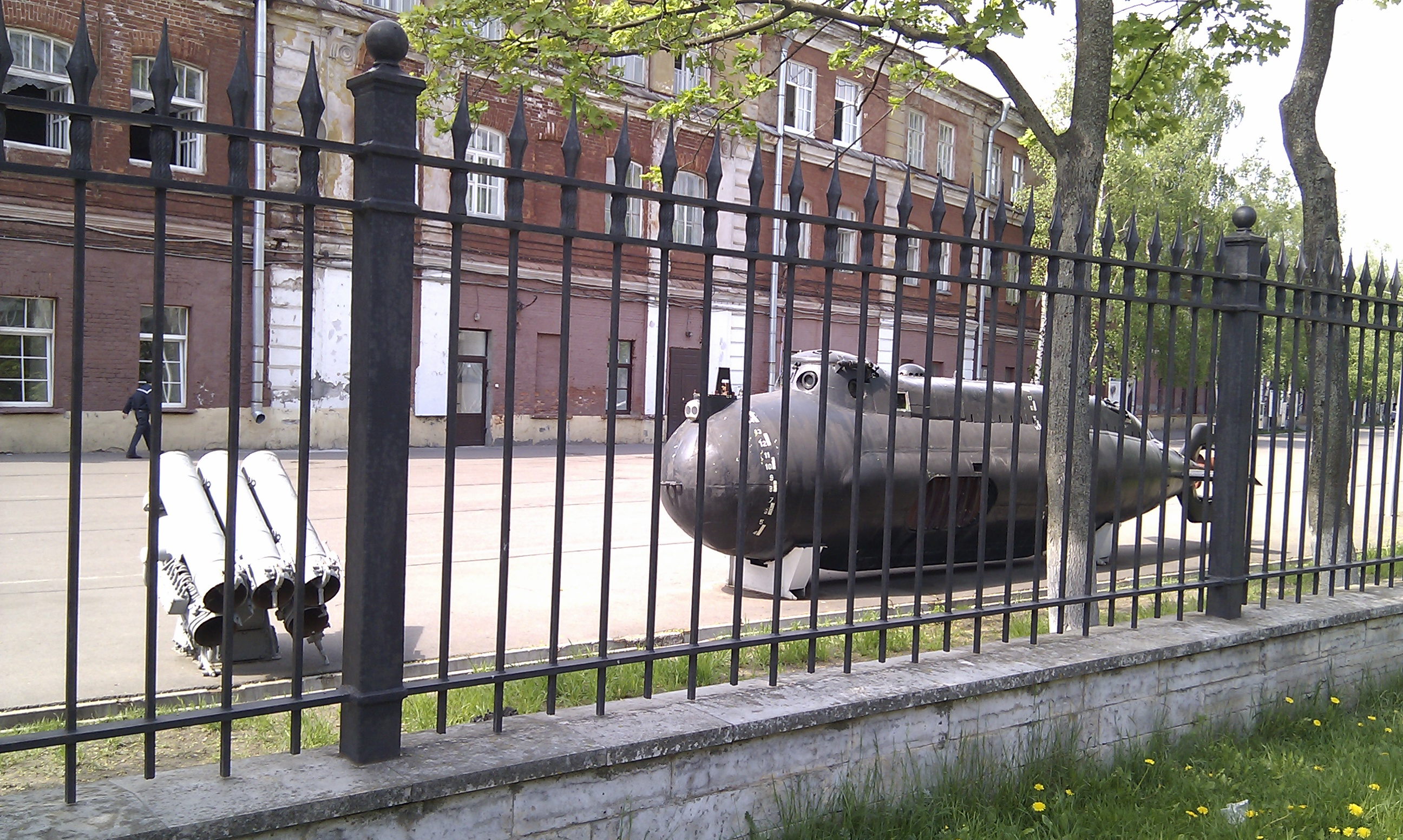 Кронштадтский морской кадетский военный корпус, улица Зосимова, 15